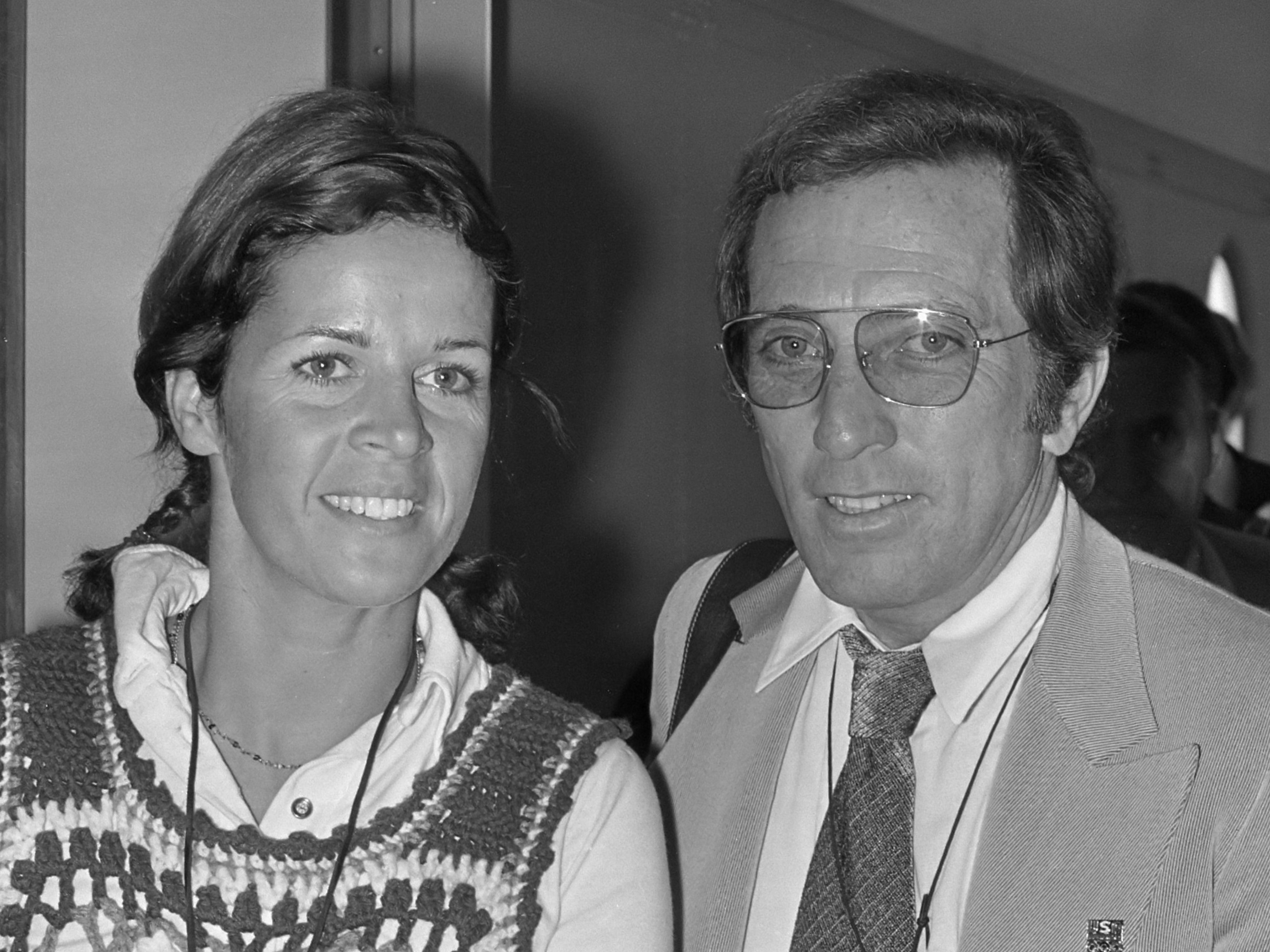 Andy Williams met echtgenote op Schiphol (kop) 1 september 1972